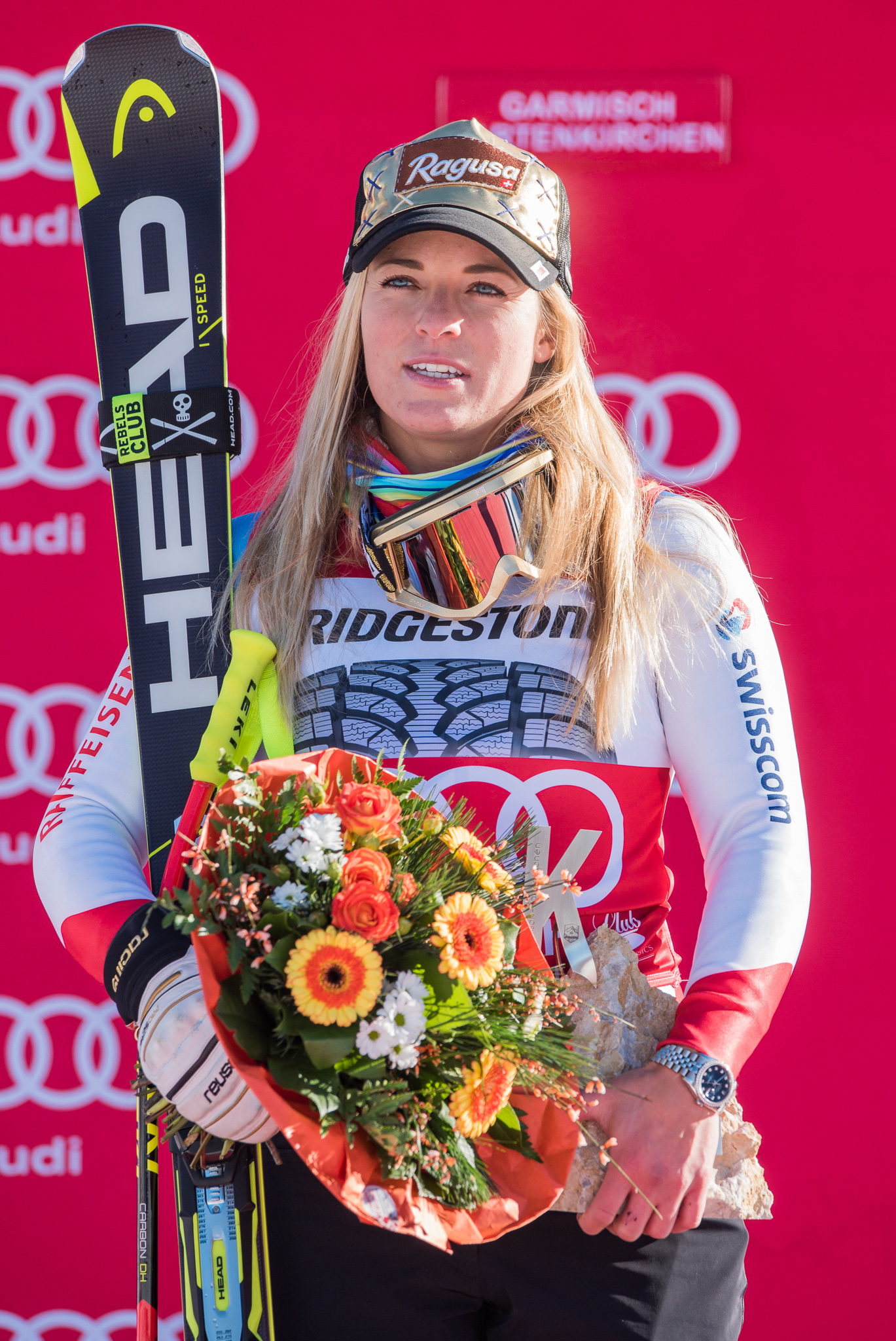 64. Kandahar Rennen,Audi FIS Ski Weltcup Garmisch-Partenkirchen,Damen Super-G,Kandahar,Ladies Super-G,Lara Gut